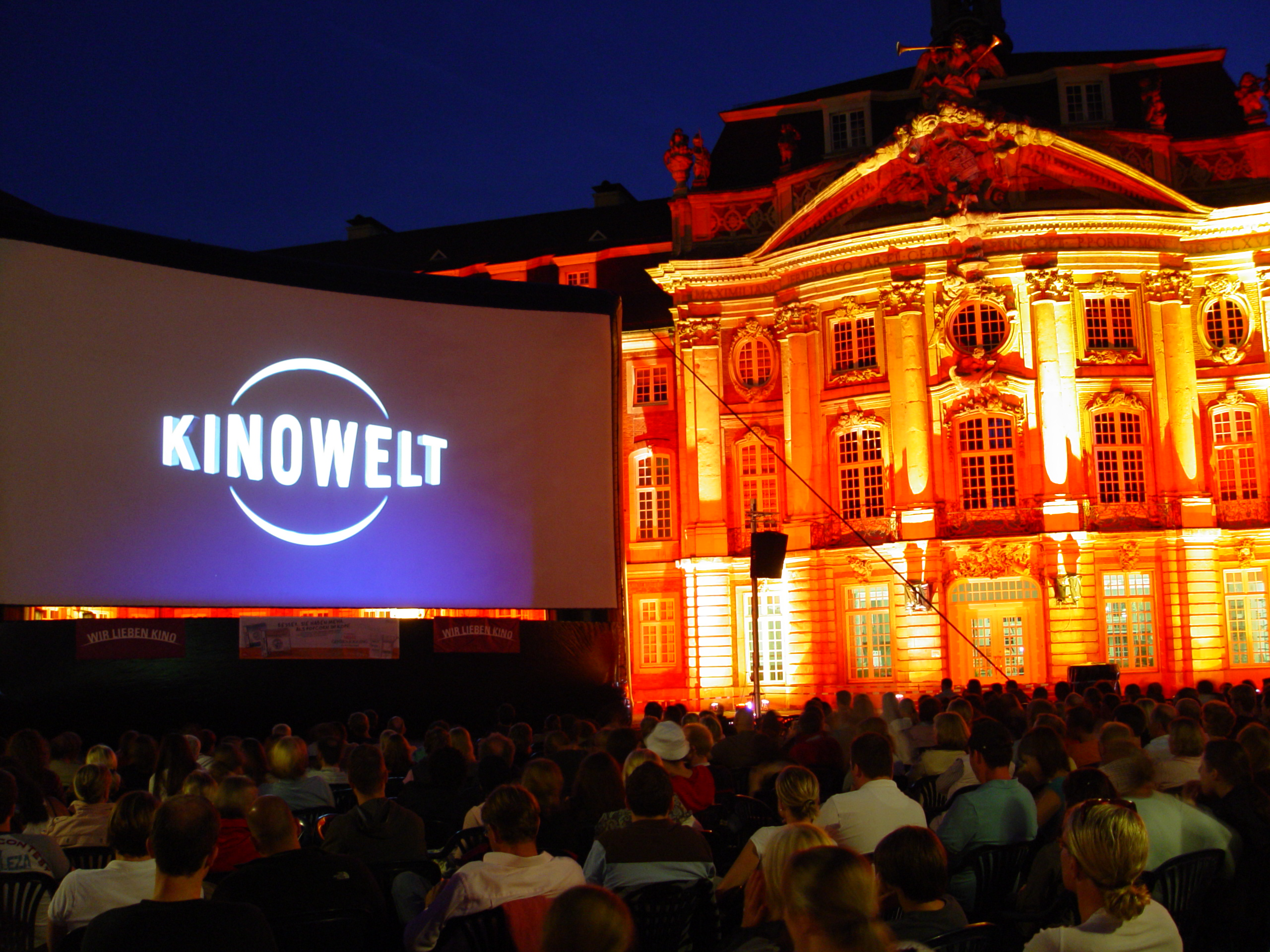 AIRSCREEN auf dem Open-Air Kino in Münster